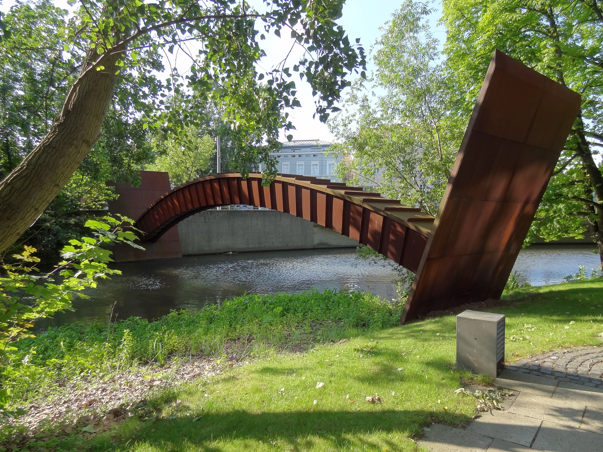 "Bogen der Erinnerung" des italienischen Lichtkünstlers Fabrizio Plessi bei Tage.